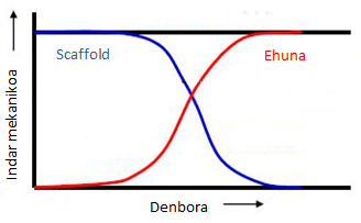 Scaffoldak eta ehunak indar mekanikoa jasotzeko duten gaitasuna denboraren zehar